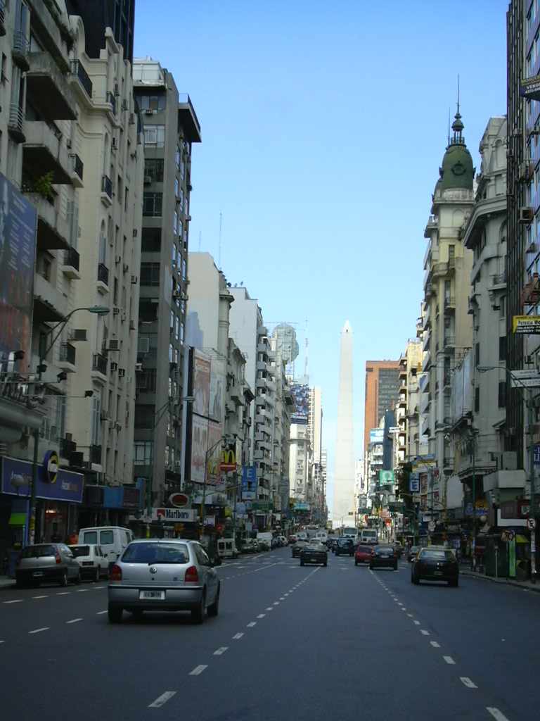 La avenida Corrientes en Buenos Aires, con el obelisco al fondo.